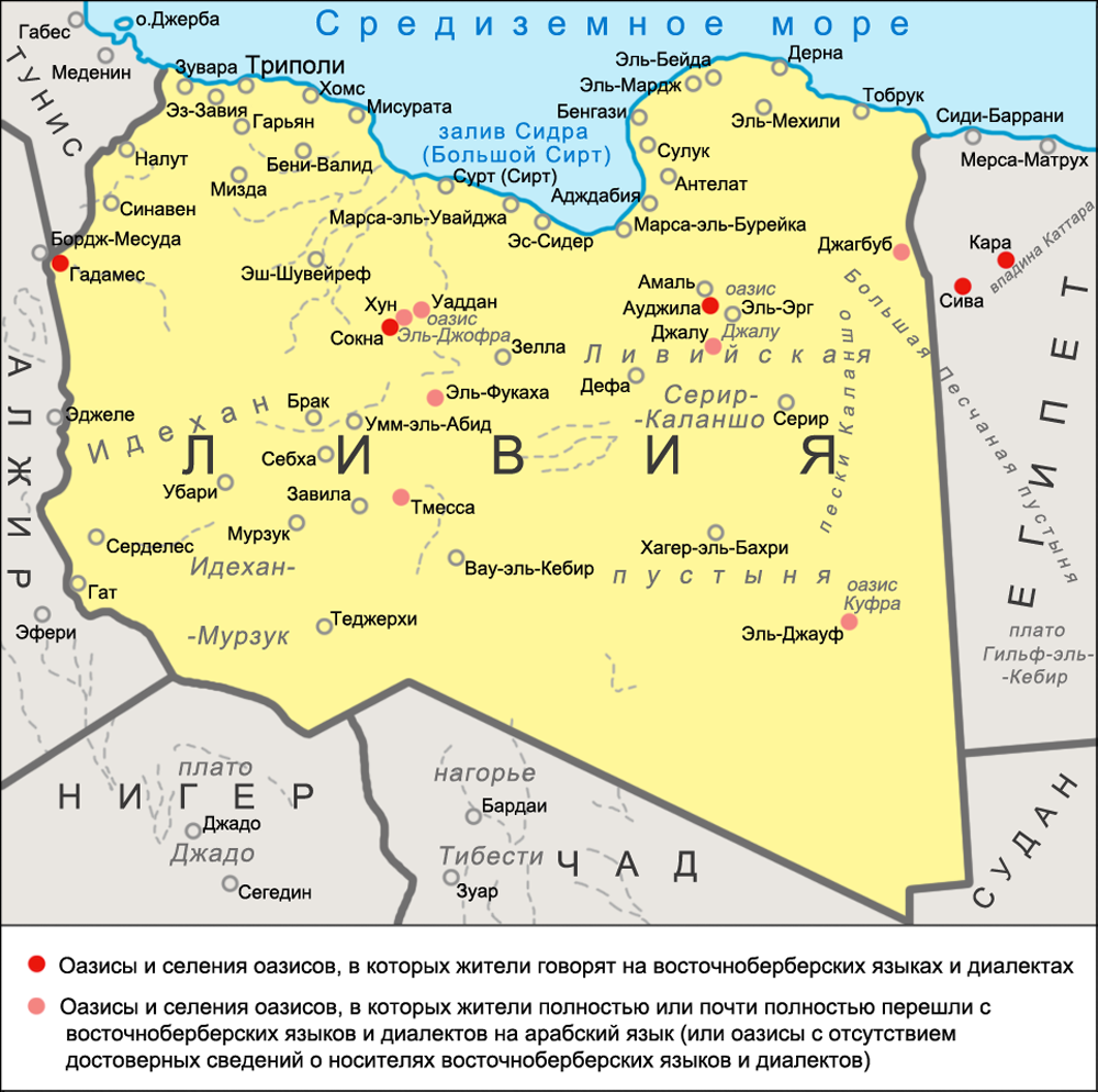 Карта оазисов и населённых пунктов восточноберберского ареала с берберским или с арабизированным берберским населением. Источник: Lingvarium. Языки Африки. Берберо-канарская семья